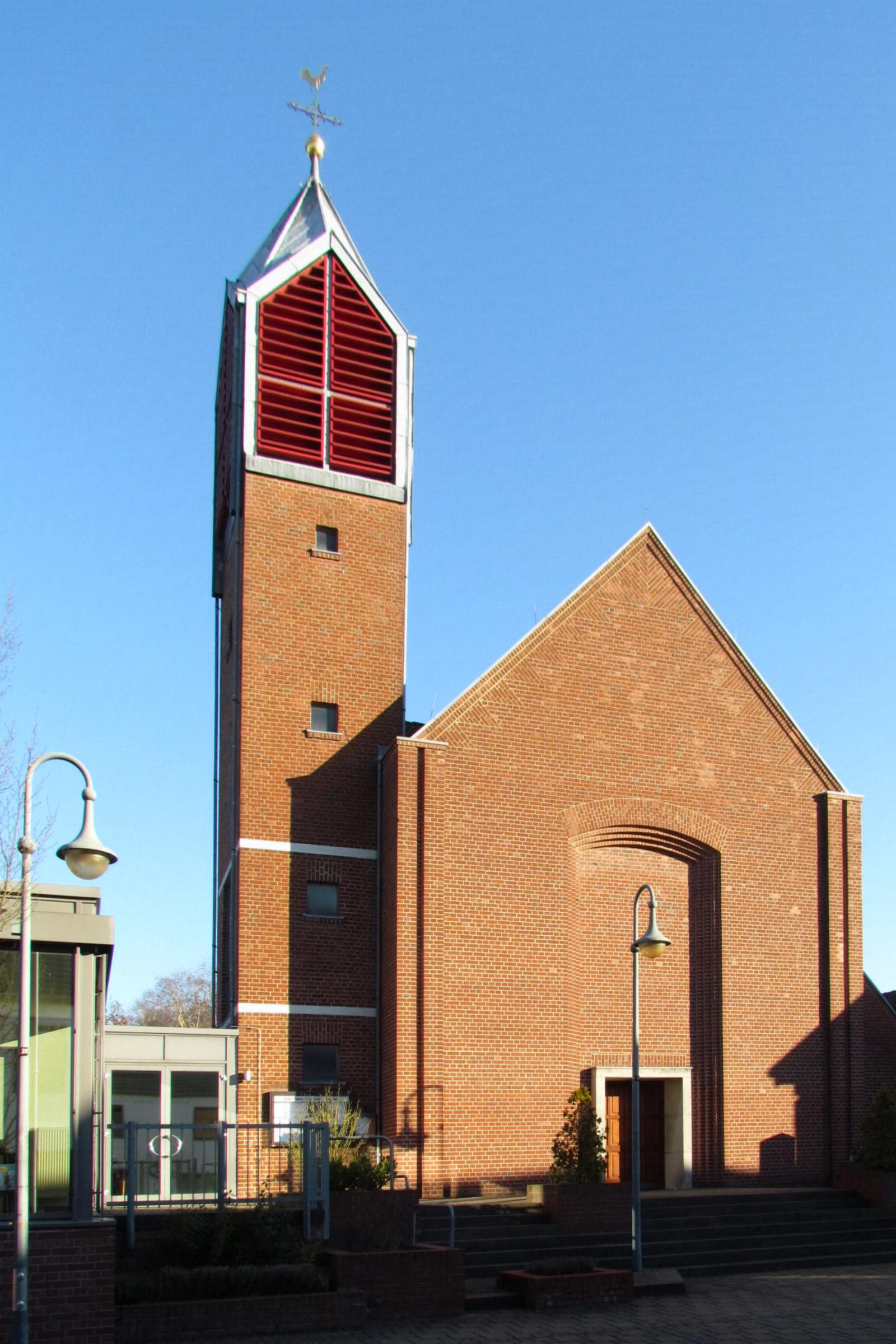 Kirchen und Kapellen in Erkelenz